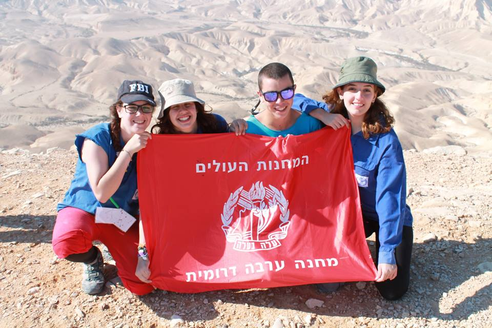 חניכים בטיול בנגב - מסע חנוכה 2015